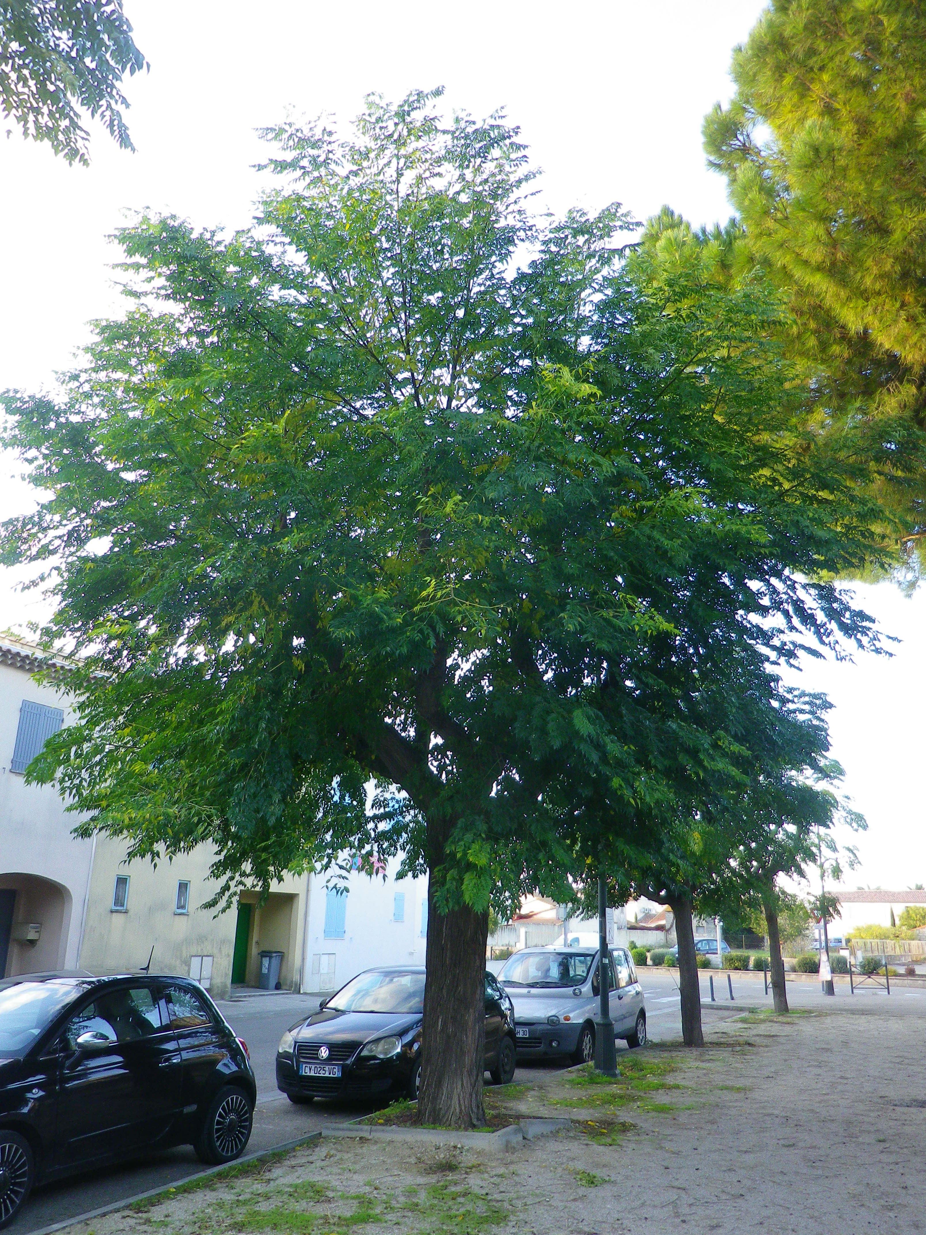 Arbre dans une rue à Fourques